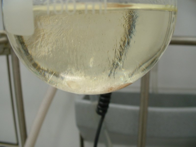 Benzophenoxim kristallisiert aus